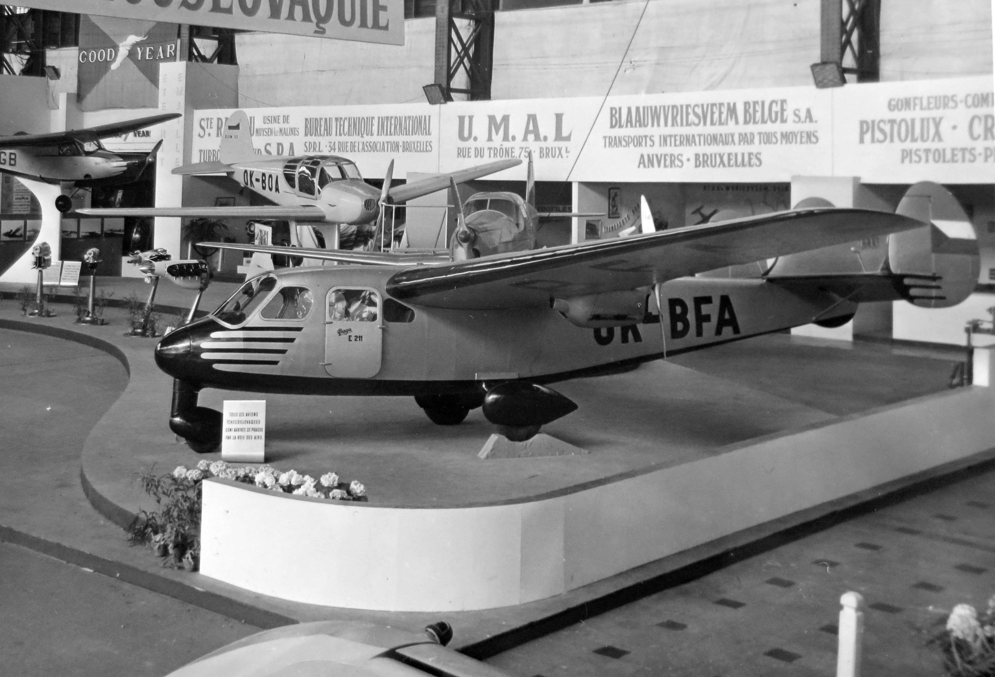 Praga E-211 s motorem Minor 4-III na výstavě v Bruselu (1947)